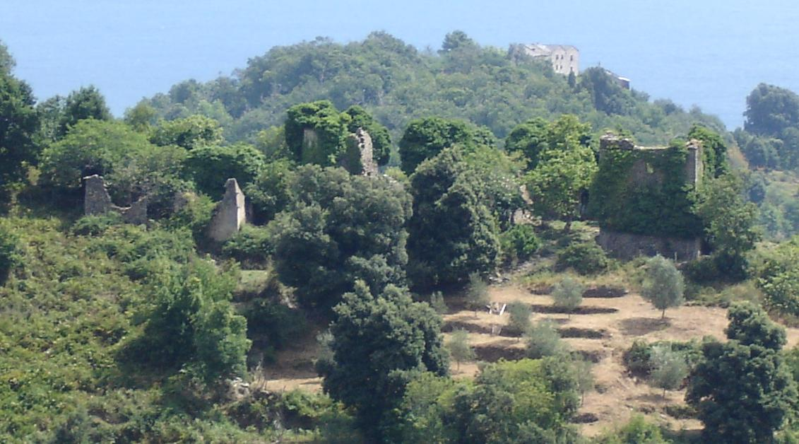 Inelaccia